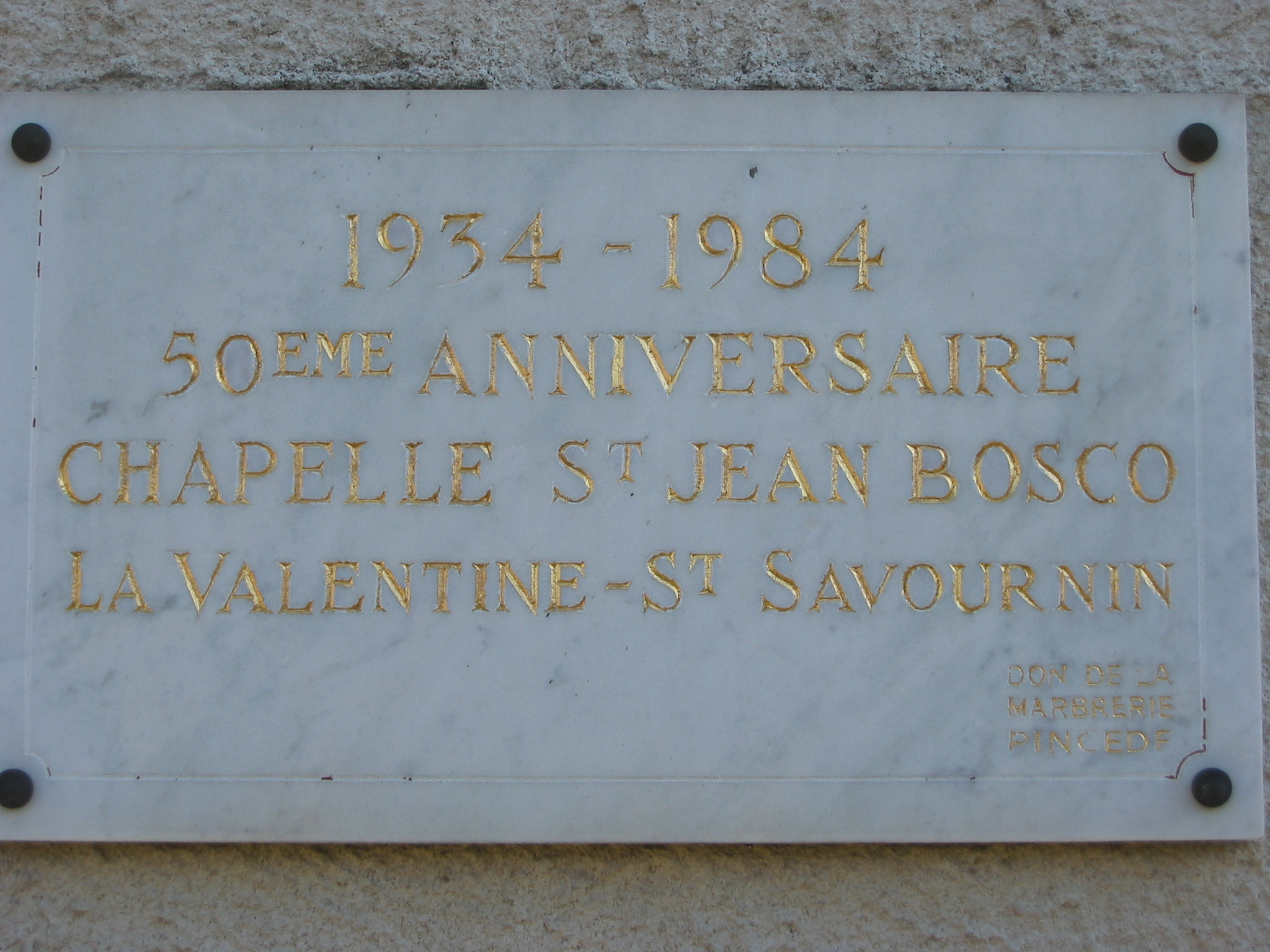 La plaque célébrant les 50 ans de la chapelle Saint Jean Bosco de La Valentine (commune de Saint-Savournin, Bouches-du-Rhône, France). Photo prise le 1er mars 2006. Auteur : Ludovic Ruat (utilisateur:civodule)